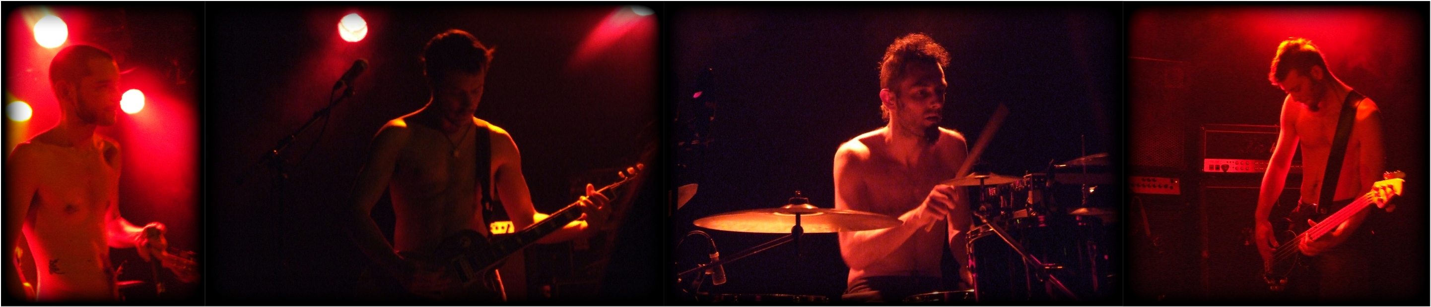 Maczde Carpate en concert à La Laiterie à Strasbourg le 27 novembre 2006 (montage)